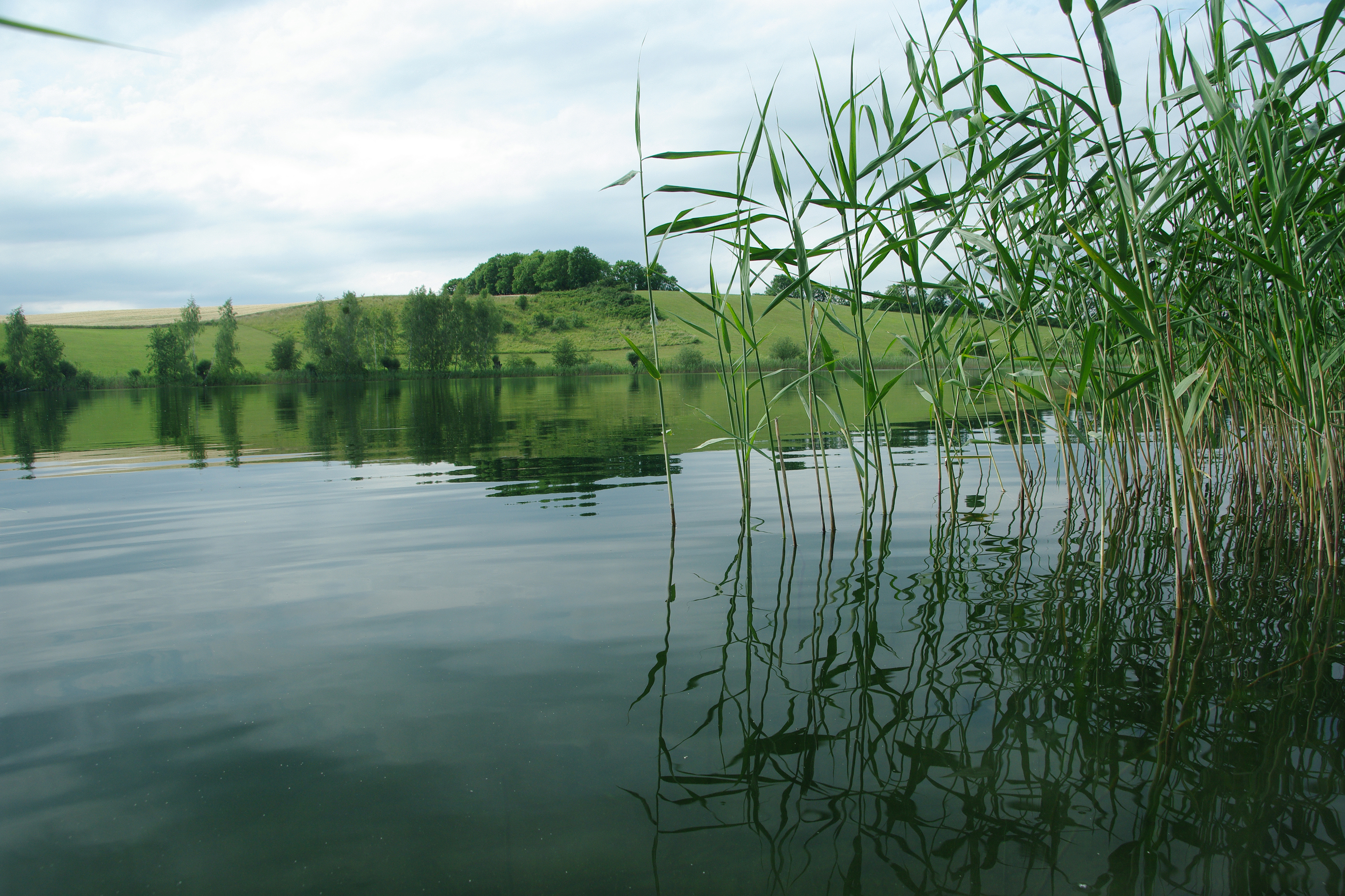 Mesotropher Klarwassersee bei Bölkendorf (Angermünde, Lkr. Uckermark, Brandenburg). Der See liegt im Biosphärenreservat und EU-Vogelschutzgebiet „Schorfheide-Chorin“ und ist als NSG „Tiefer See“ (sowie mit Umgebung auch als FFH-Gebiet DE-3050-302 „Tiefer See“) geschützt.